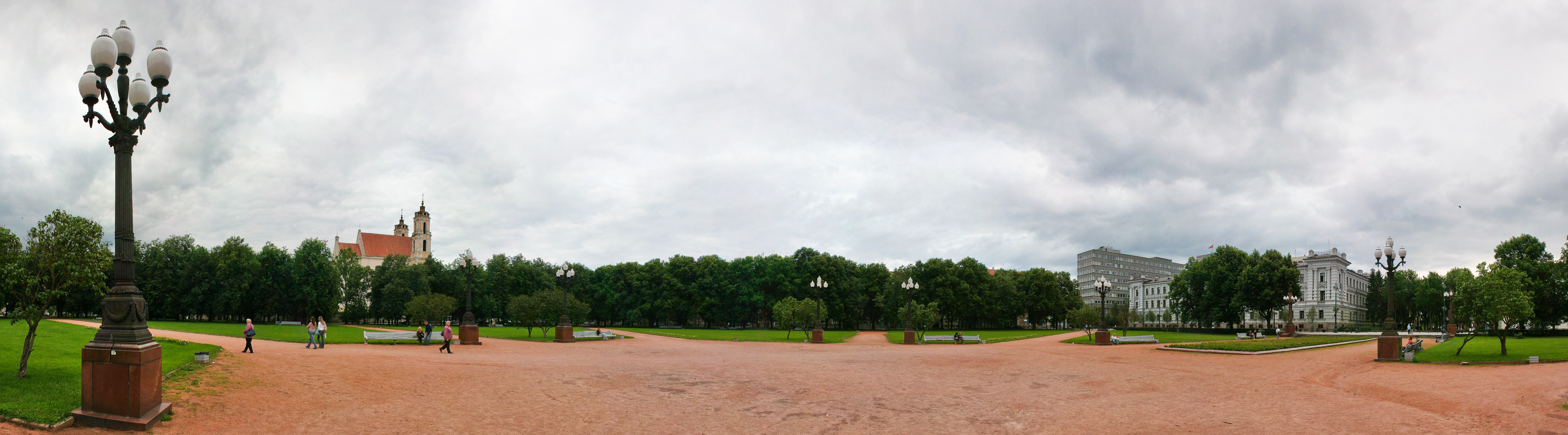 Lukiškės Square in Vilnius panorama